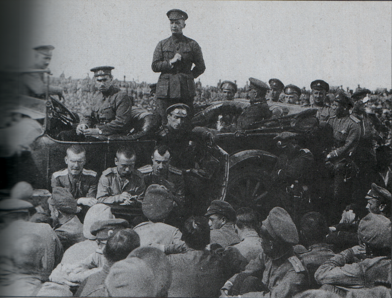 Kérenski, ministro de Defensa del Gobierno provisional ruso, dirigiéndose a los soldados del frente en mayo de 1917.